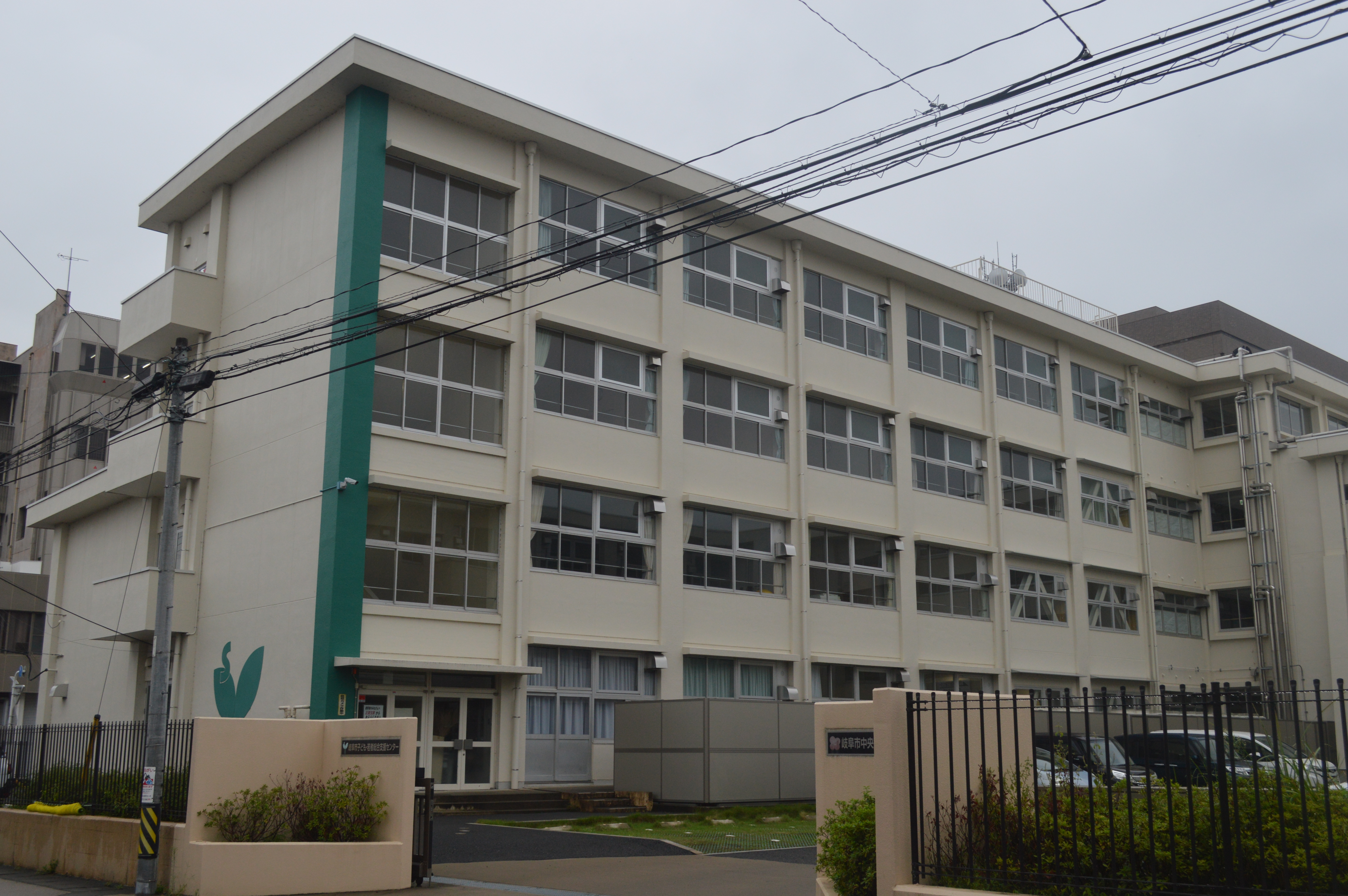 旧岐阜市立明徳小学校。2012年3月閉校。跡地の校舎には2014年3月に岐阜市子ども若者総合支援センターが開所。岐阜市今川町。